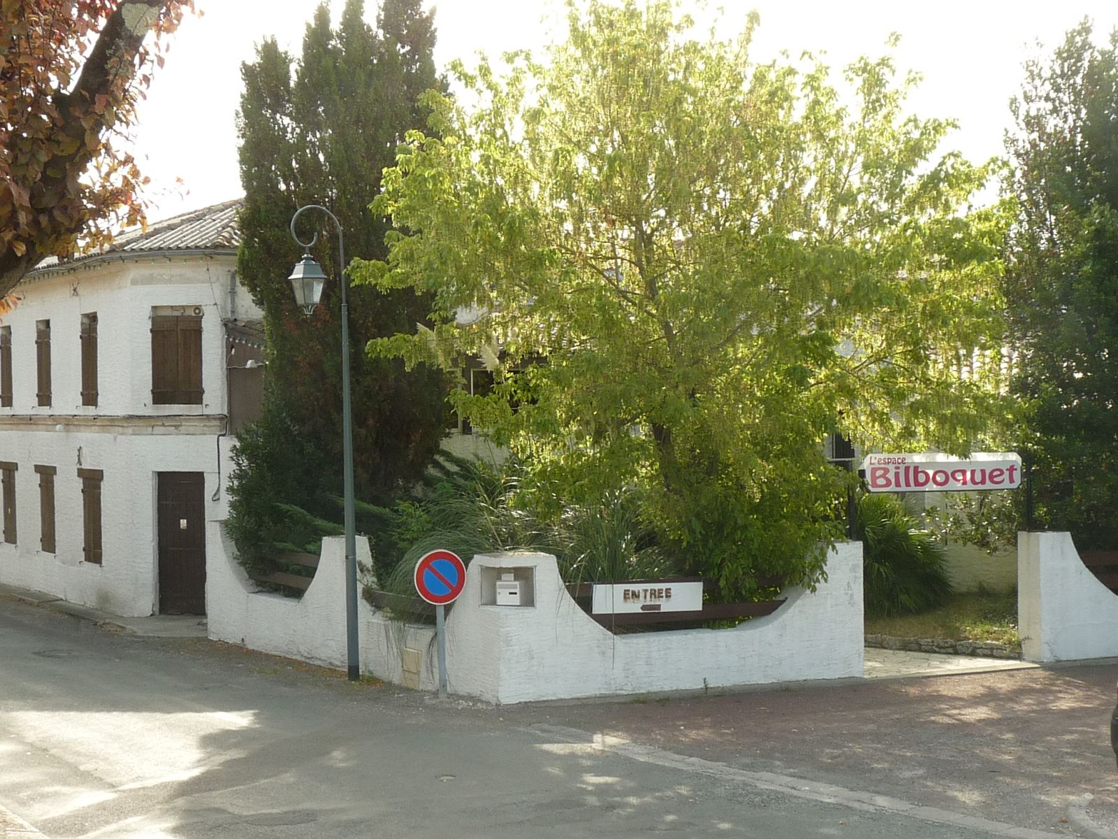 discothèque à Epargnes (17), France